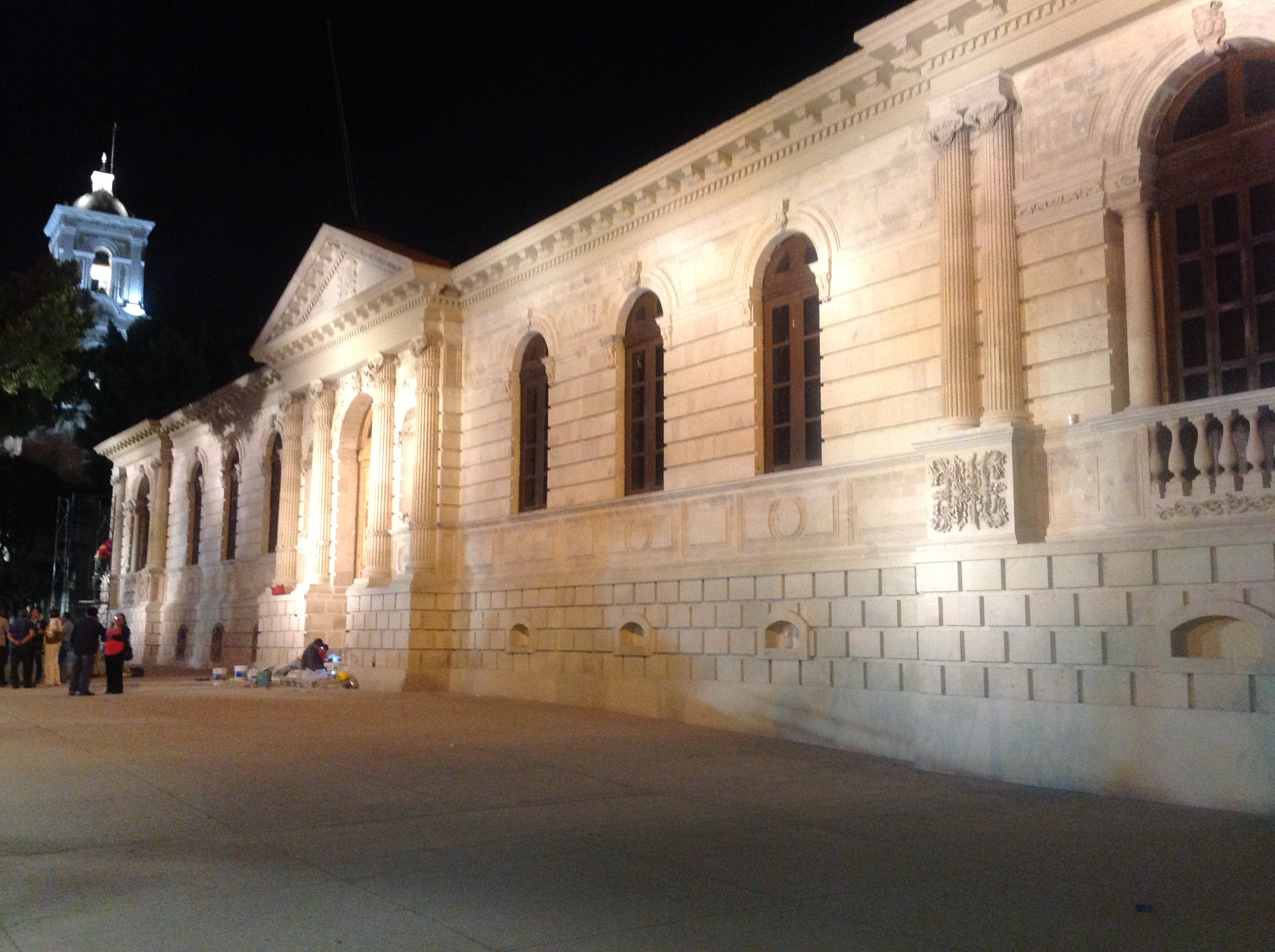 VISTA NOCTURNA CON LA ILUMINACIÓN DEL MONUMENTO.